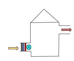 Schéma explicatif de la VMC simple flux